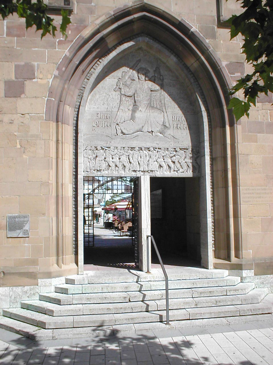 Portal des Hafenmarktturms in Heilbronn